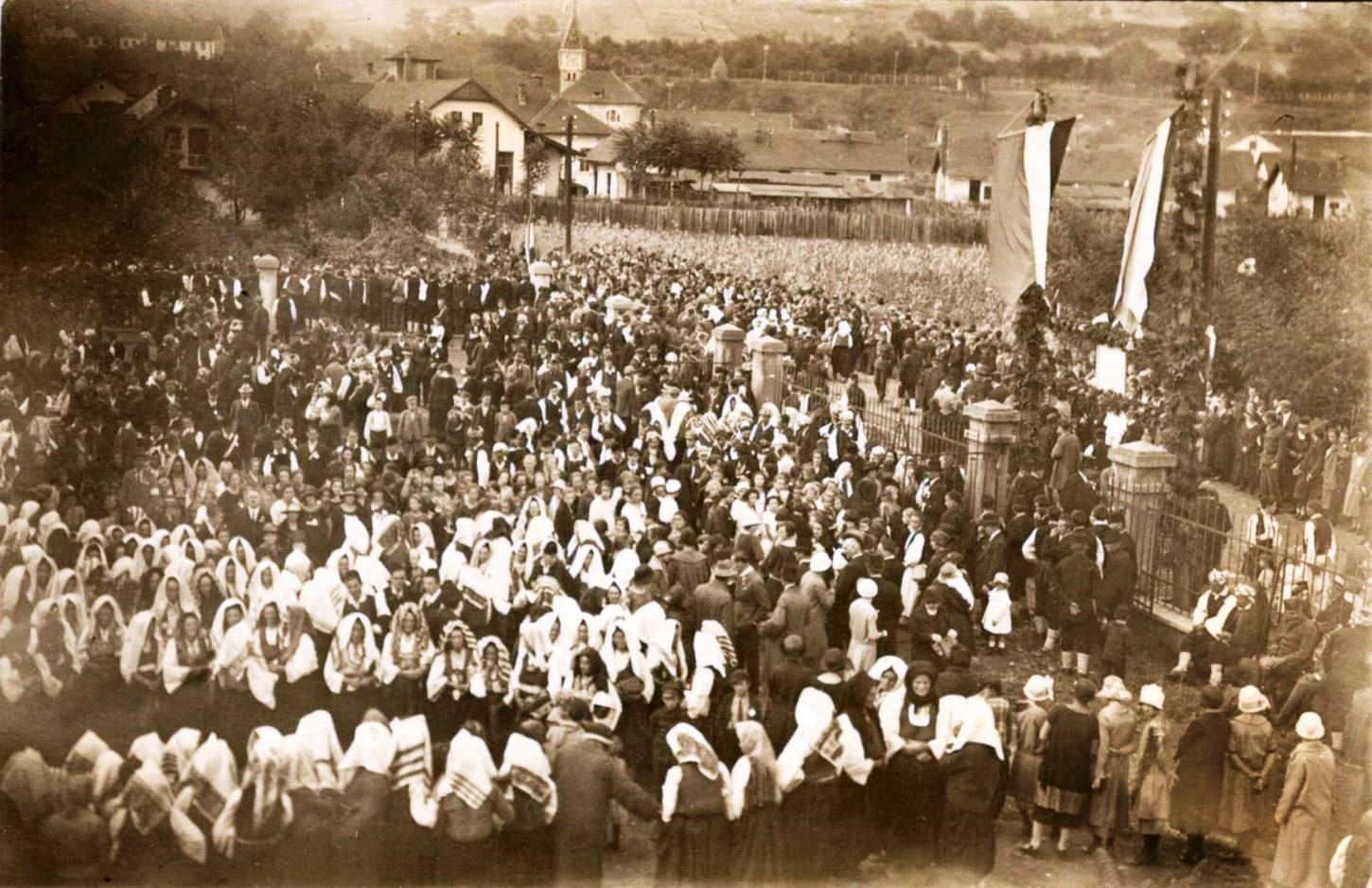 ЗЕНИЦА - ЗБОР ПРЕД ЦРКВОМ СВ. ИЛИЈЕ, 1932. Г. На слици се види народни збор пред католичком Црквом Светог Илије Пророка. Дан је празнични, Свети Илија: 20. јула 1932. (по јулијанском календару) — 2. августа 1932. (по грегоријанском календару). Сијено је стожено у пласт; одјећа дама у доњем десном углу дочарава лијепо топло јулско љетње вријеме.